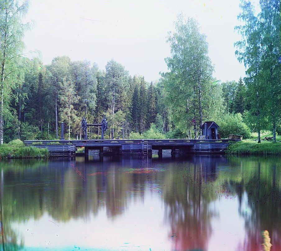 Ковжская плотина. Мариинская водная система. Фотография С.М. Прокудина-Горского 20966. 1909 г.